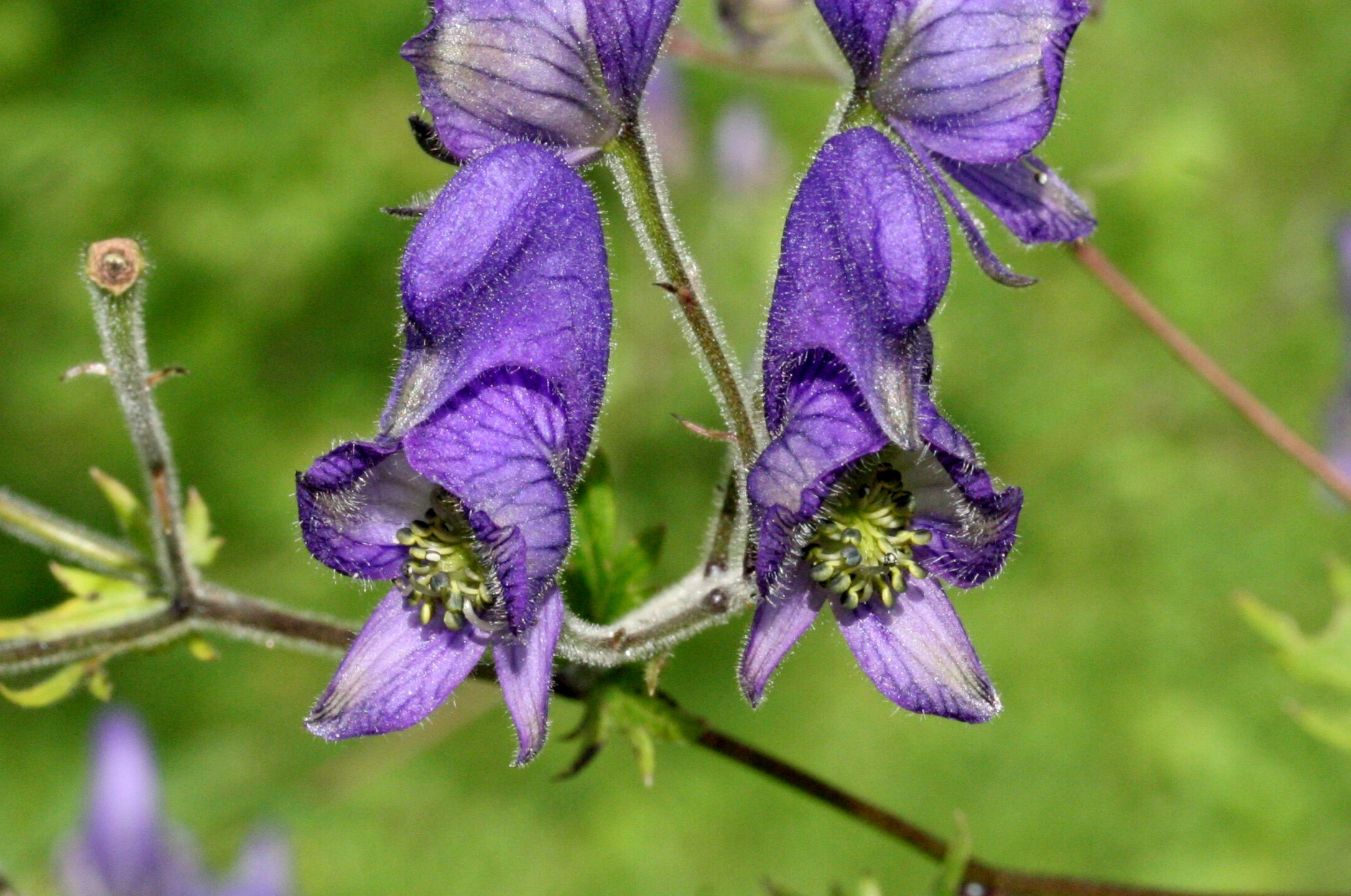 Località: "Giardino Botanico delle Alpi Orientali", Monte Faverghera (BL), 1500 m s.l.m.